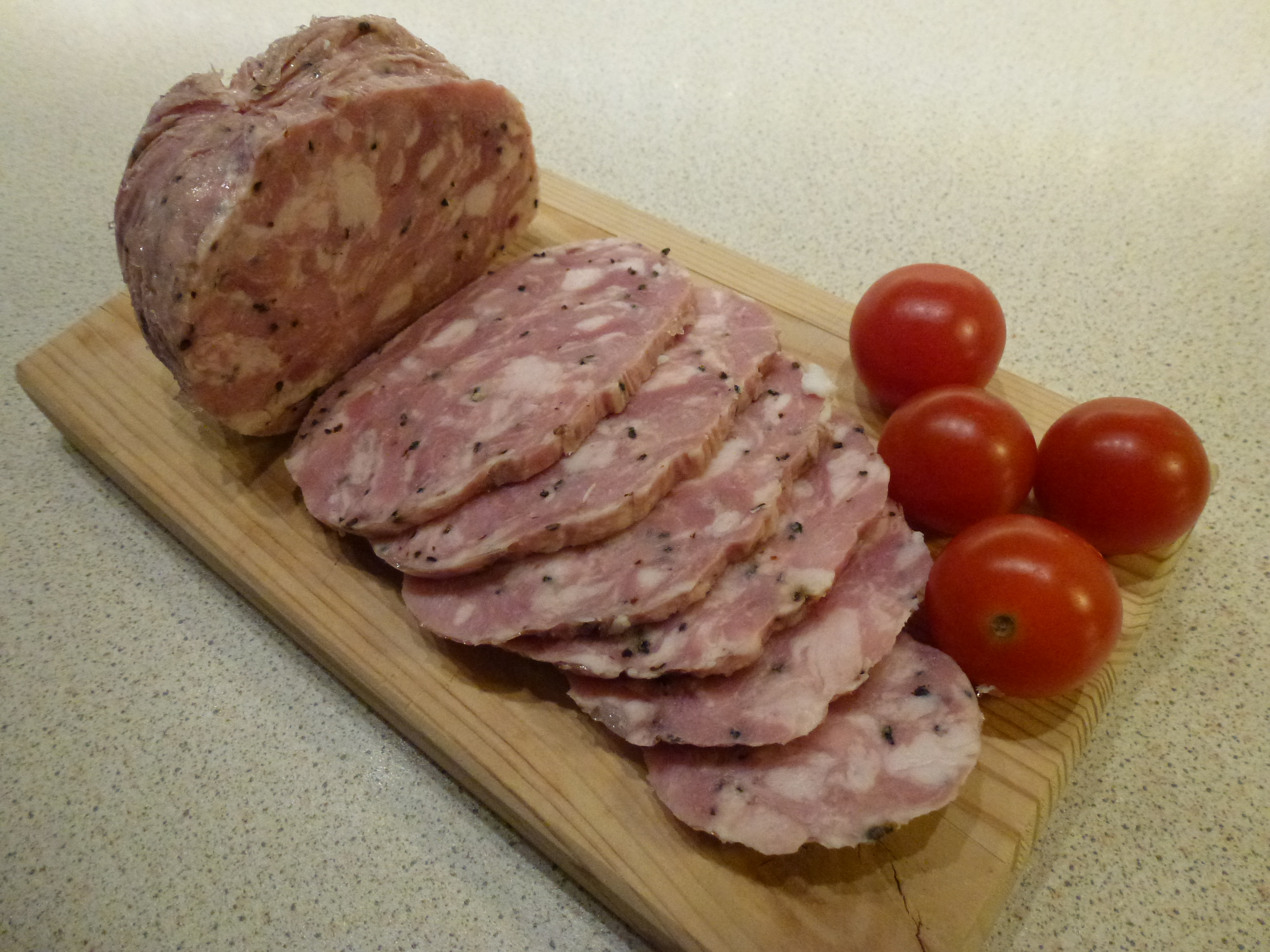 Pressylta